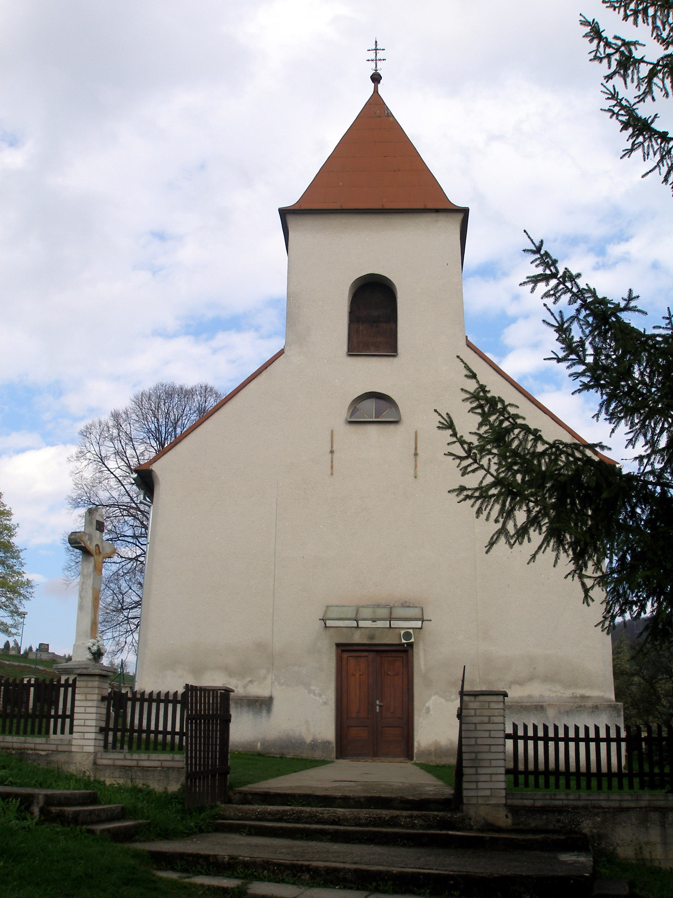 Obec Varhaňovce okres Prešov región Šariš